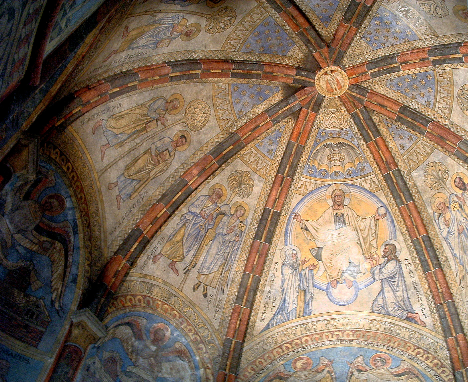 Metz - Chapelle des Templiers - Fresque de la voûte faite au XIXe siècle